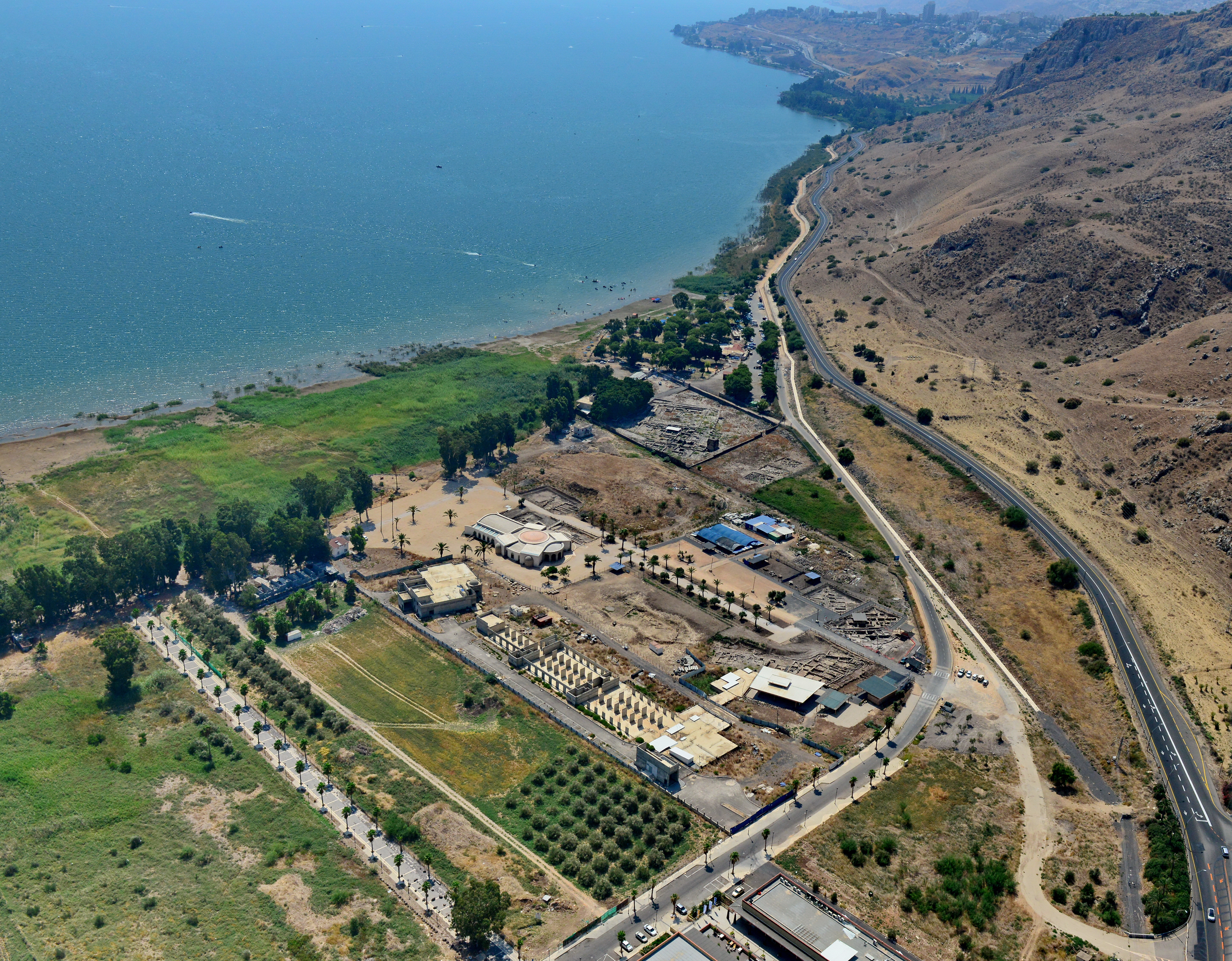 עיר קדומה בגליל, ששכנה לחוף הכנרת, בדרום בקעת גינוסר, סמוך ליישוב מגדל של היום המשמר את שמה. עד להקמת העיר טבריה בשנת 20 לספירה, הייתה מגדלא המרכז העירוני היחיד בחוף המערבי של הכנרת.